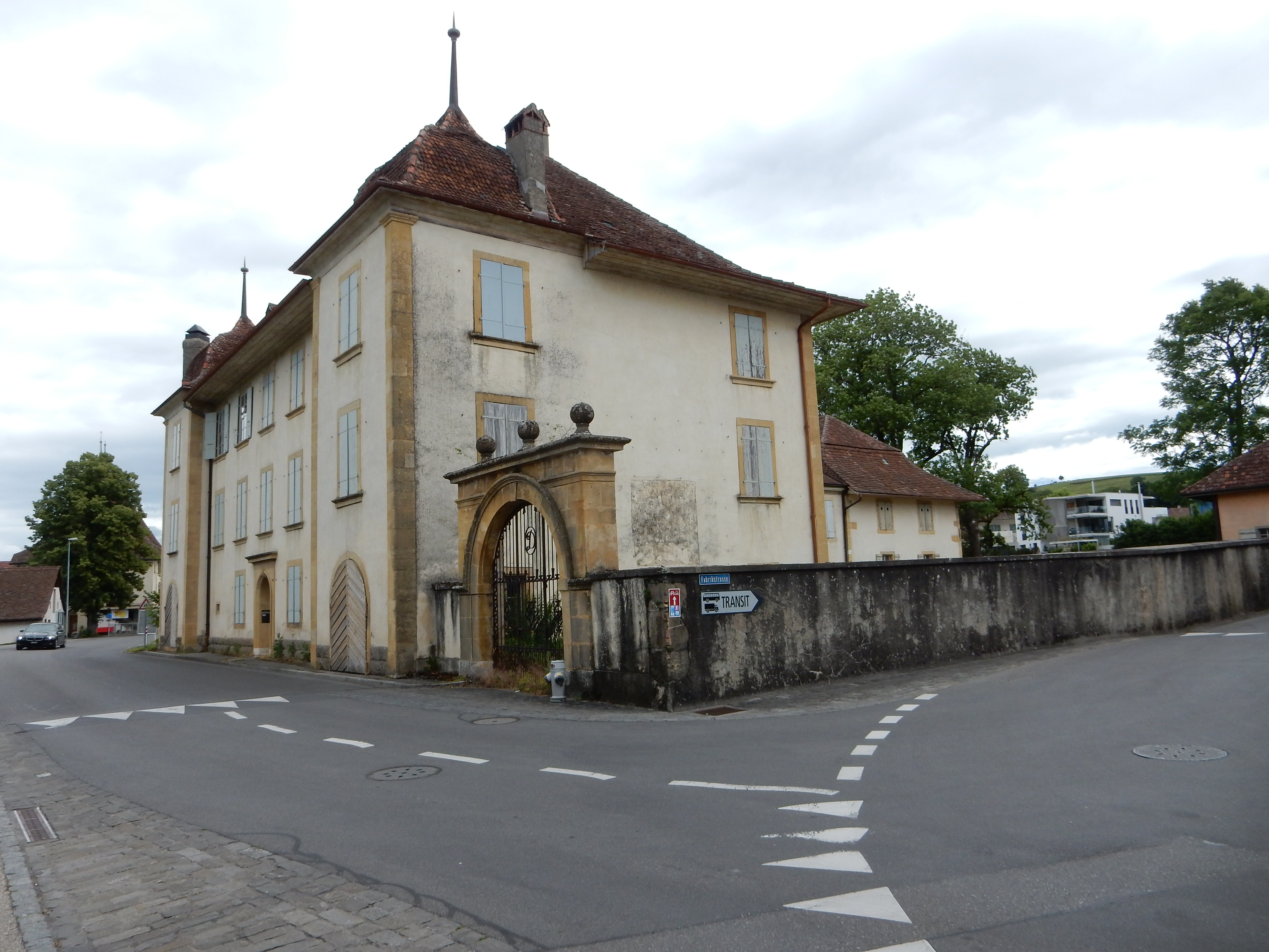 Schloss Muntelier (Kanton Freiburg, Schweiz)